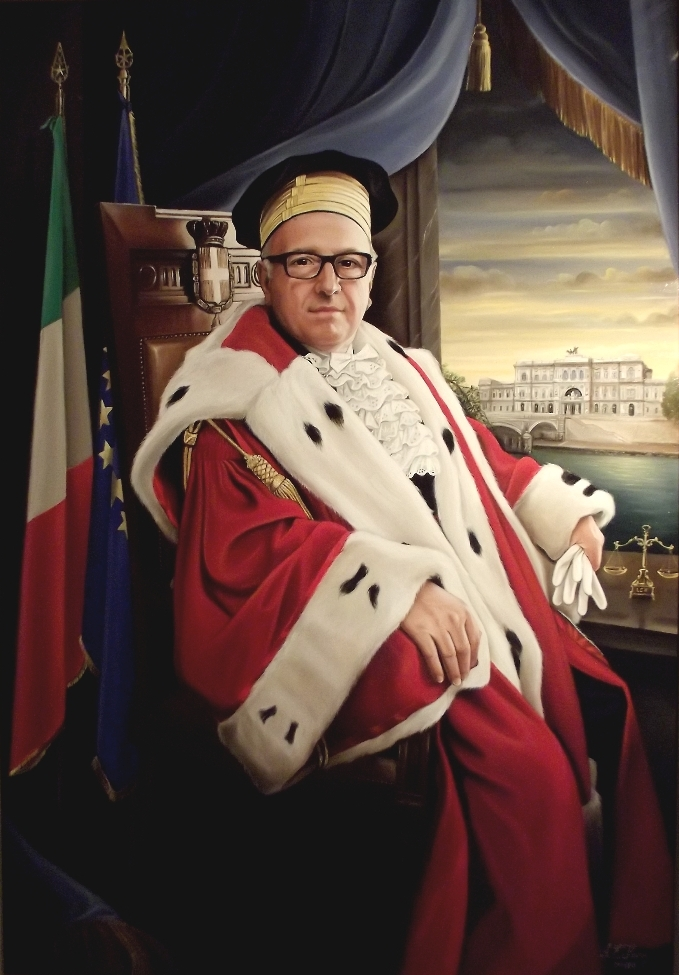 Ritratto ufficiale di Sua Eccellenza Ernesto Lupo, Primo Presidente della Suprema Corte di Cassazione. Olio su tela di Albert Edwin Flury. Roma, Palazzo di Giustizia. 2013.